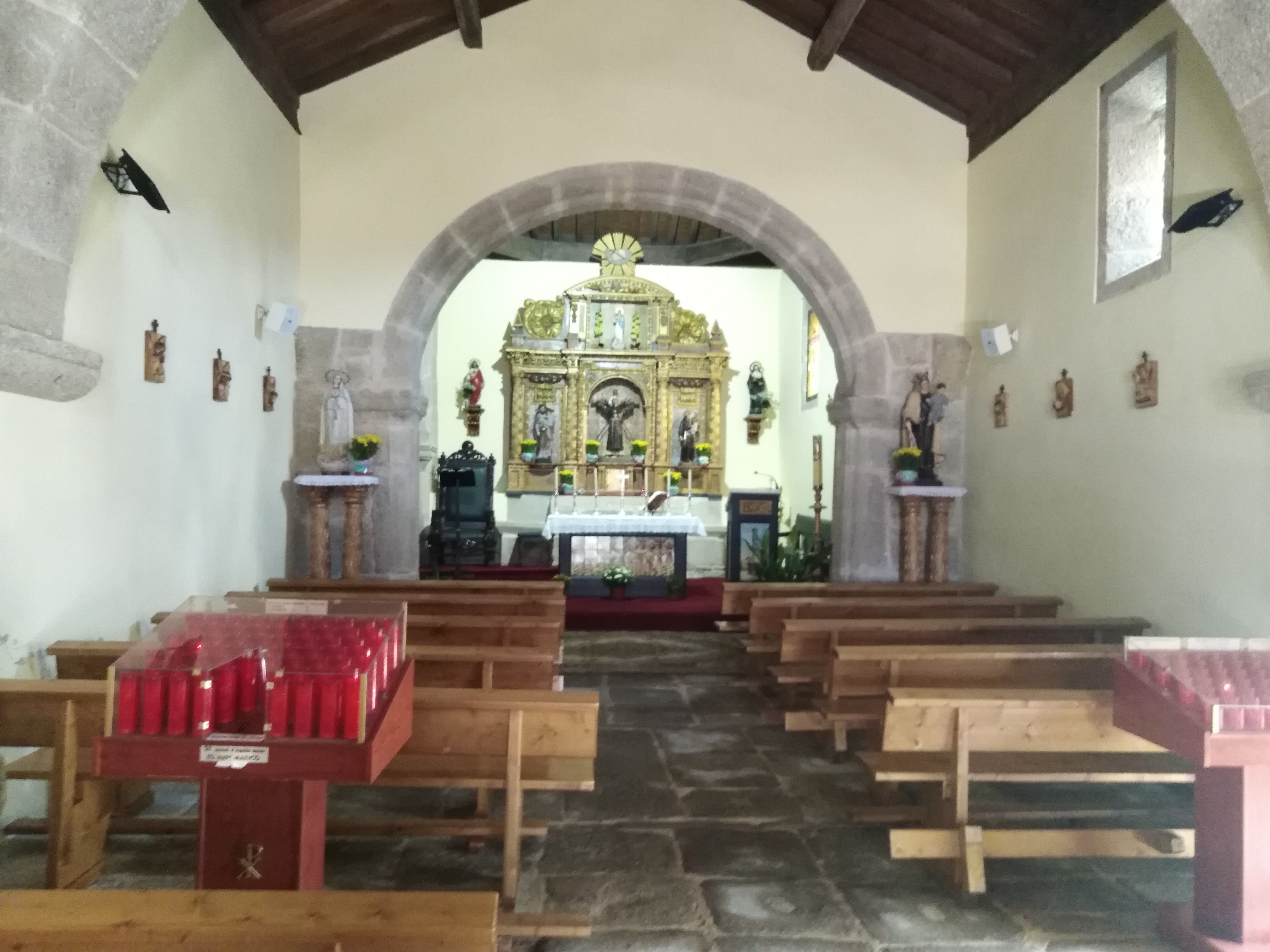 Interior da igrexa de Santa María do Tameirón (A Gudiña)